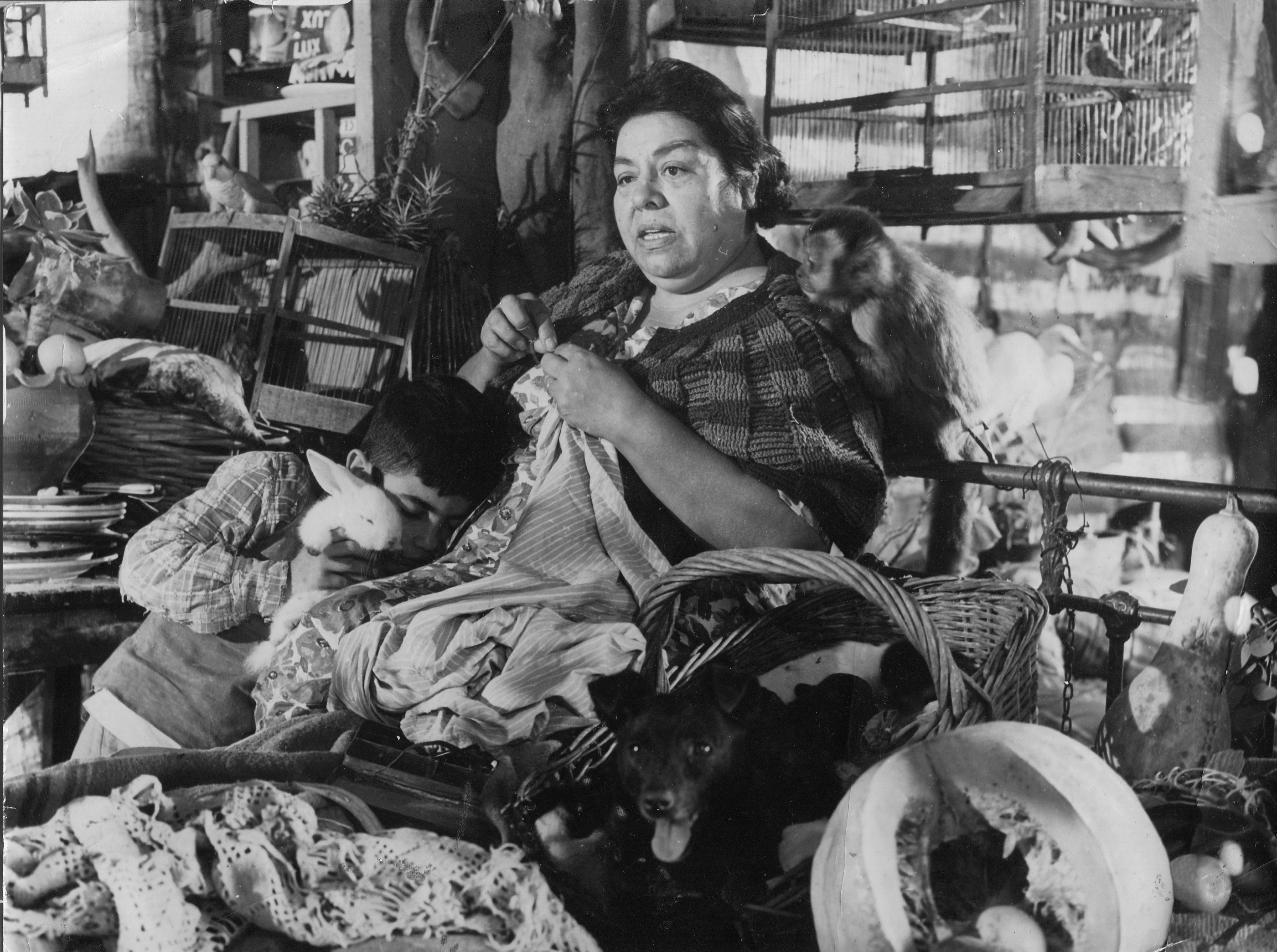 Fotografía durante el rodaje de la película "Los inundados", dirigida por Fernando Birri.